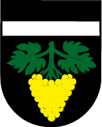 Wappen der Gemeinde Wünnewil-Flamatt